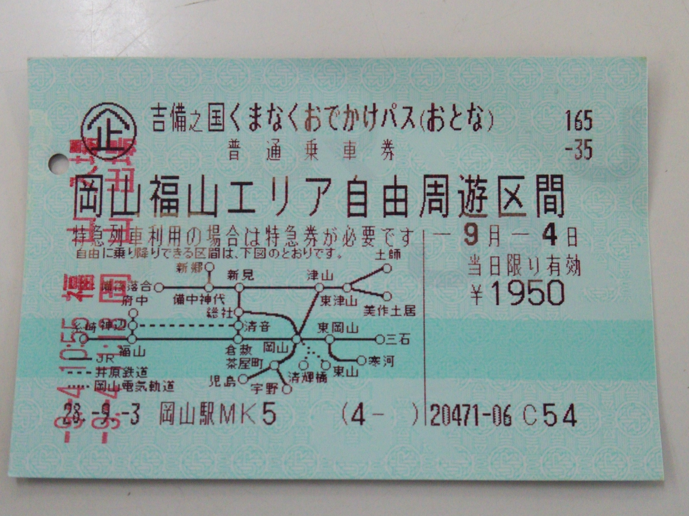 吉備之国くまなくおでかけパス 岡山駅で購入